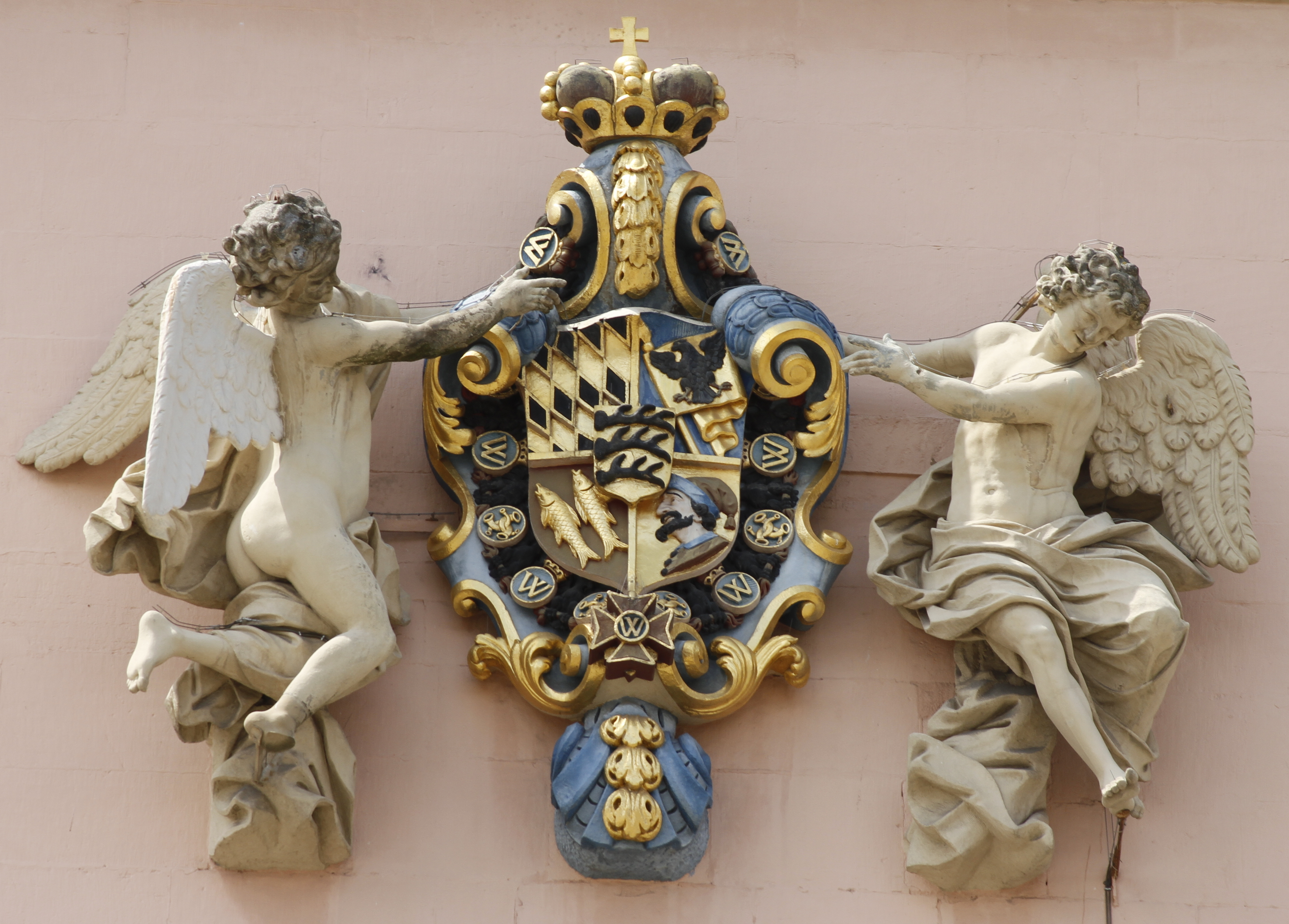 Evangelische Stadtkirche - Ludwigsburg - Germany